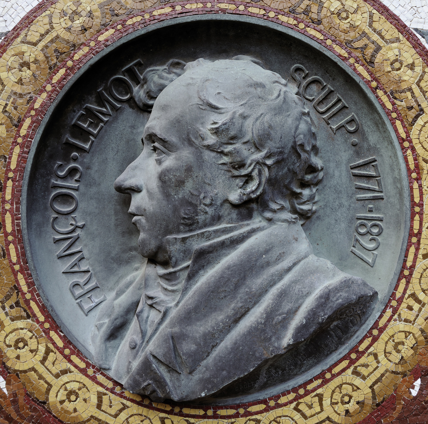 Médaillon de bronze à l'effigie de François Lemot, Pierre Aubert